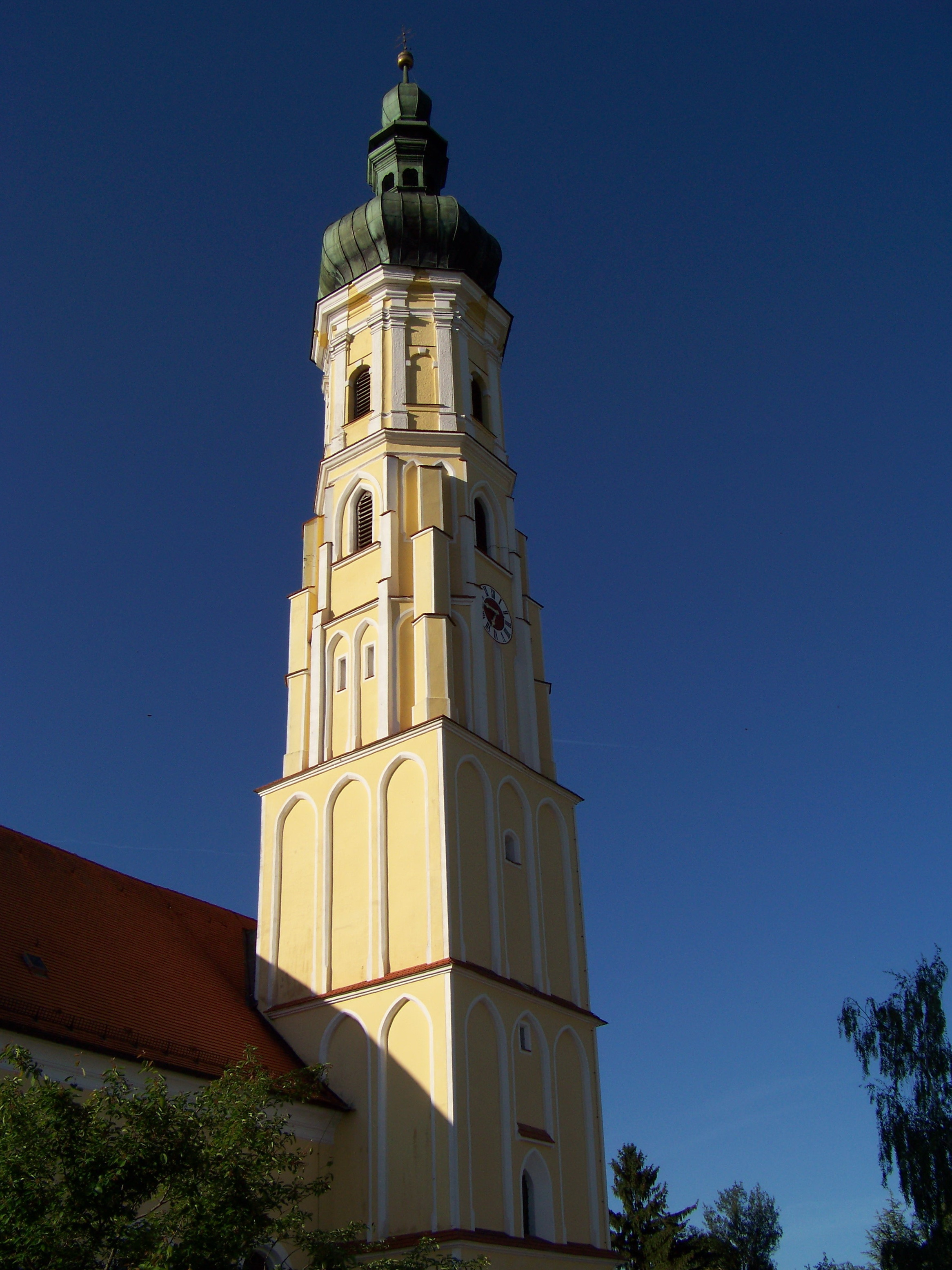 Mallersdorf-Pfaffenberg. Westen 82. Katholische Pfarrkirche Mariae Opferung. Chor und Turm um 1483. Langhaus über älterem Kern Mitte 18. Jahrhundert. Sakristei 19. Jahrhundert; mit Ausstattung.